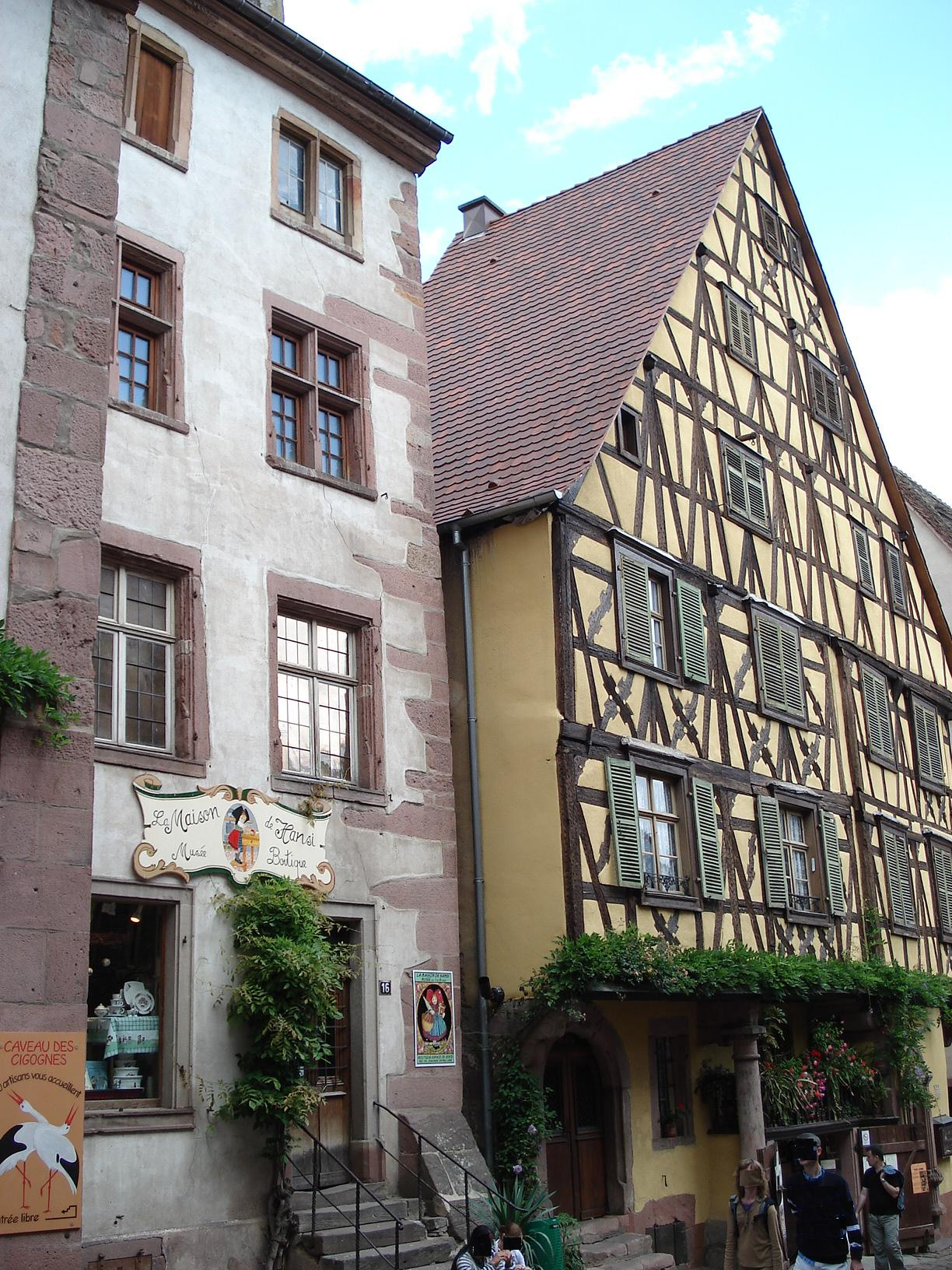 Riquewihr, Alsace (dép. du Haut-Rhin, France). Rue du Général de Gaulle ('rue principale'). À gauche : Musée «La Maison de Hansi» ; à droite : Maison Jung-Selig (1561).